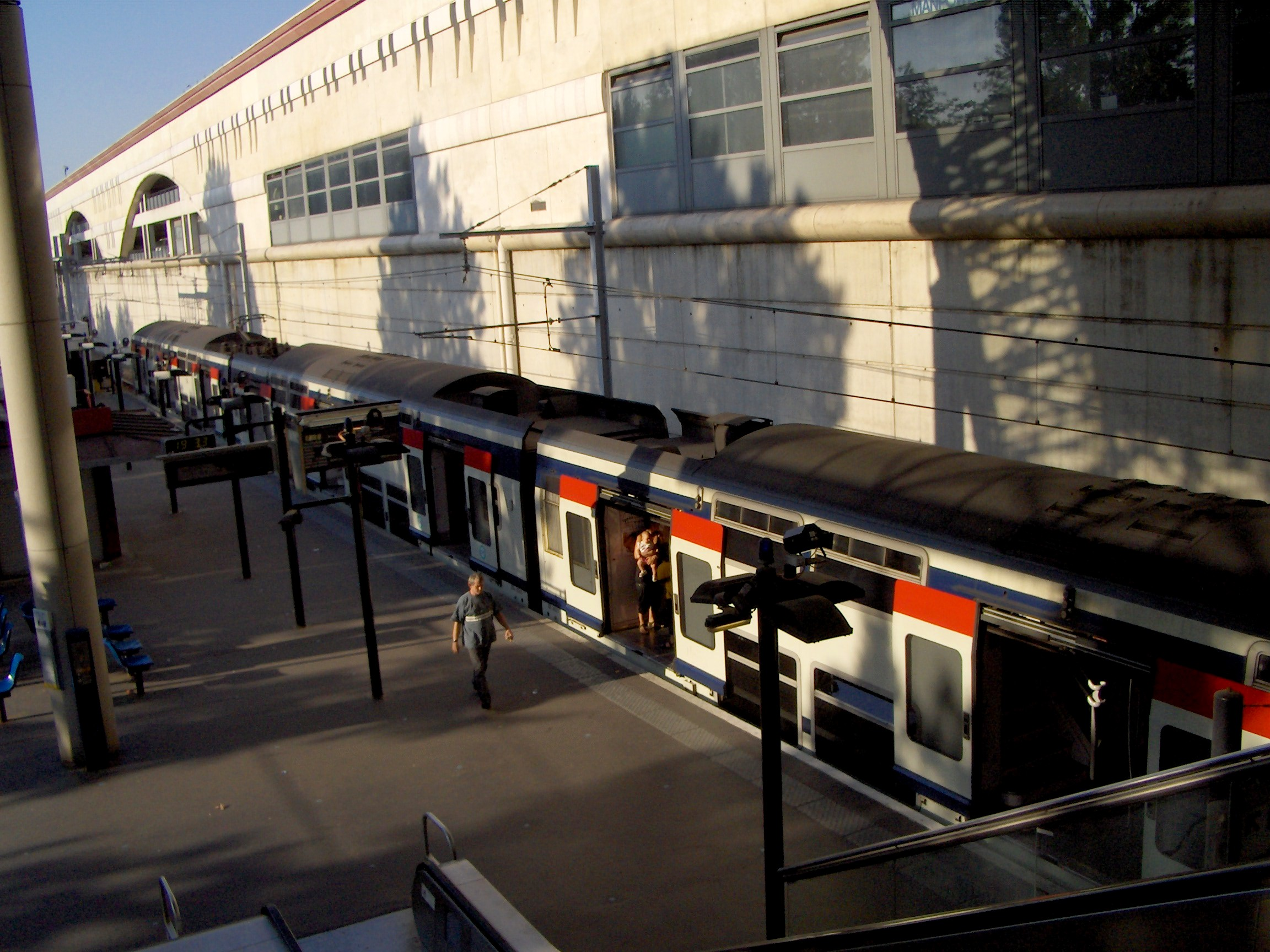 Szybka kolej RER date : july 1 2006 Author : Marcin Zieliński